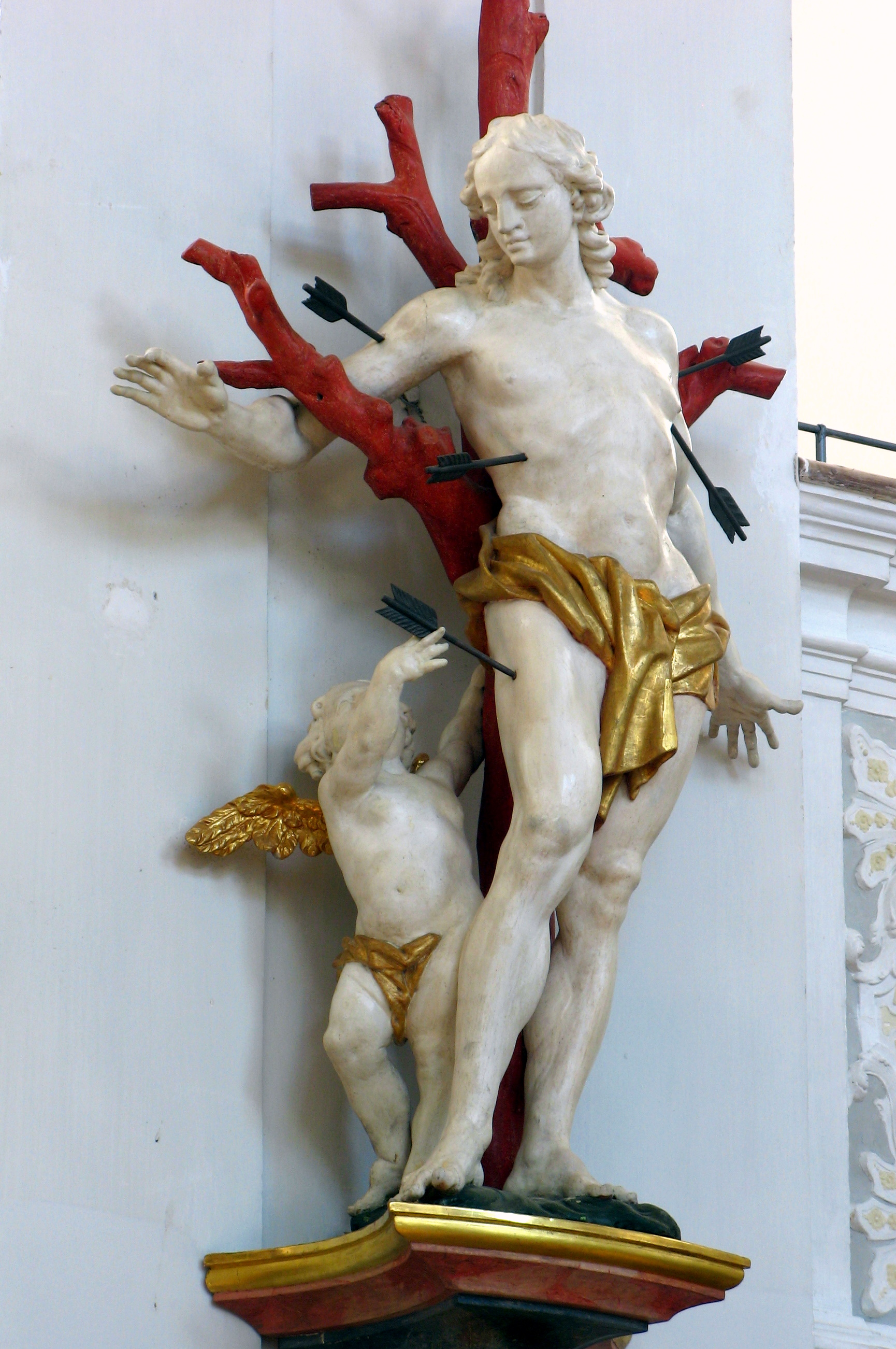 Hl. Sebastian von Anton Sturm in der Pfarrkirche in Wolfegg